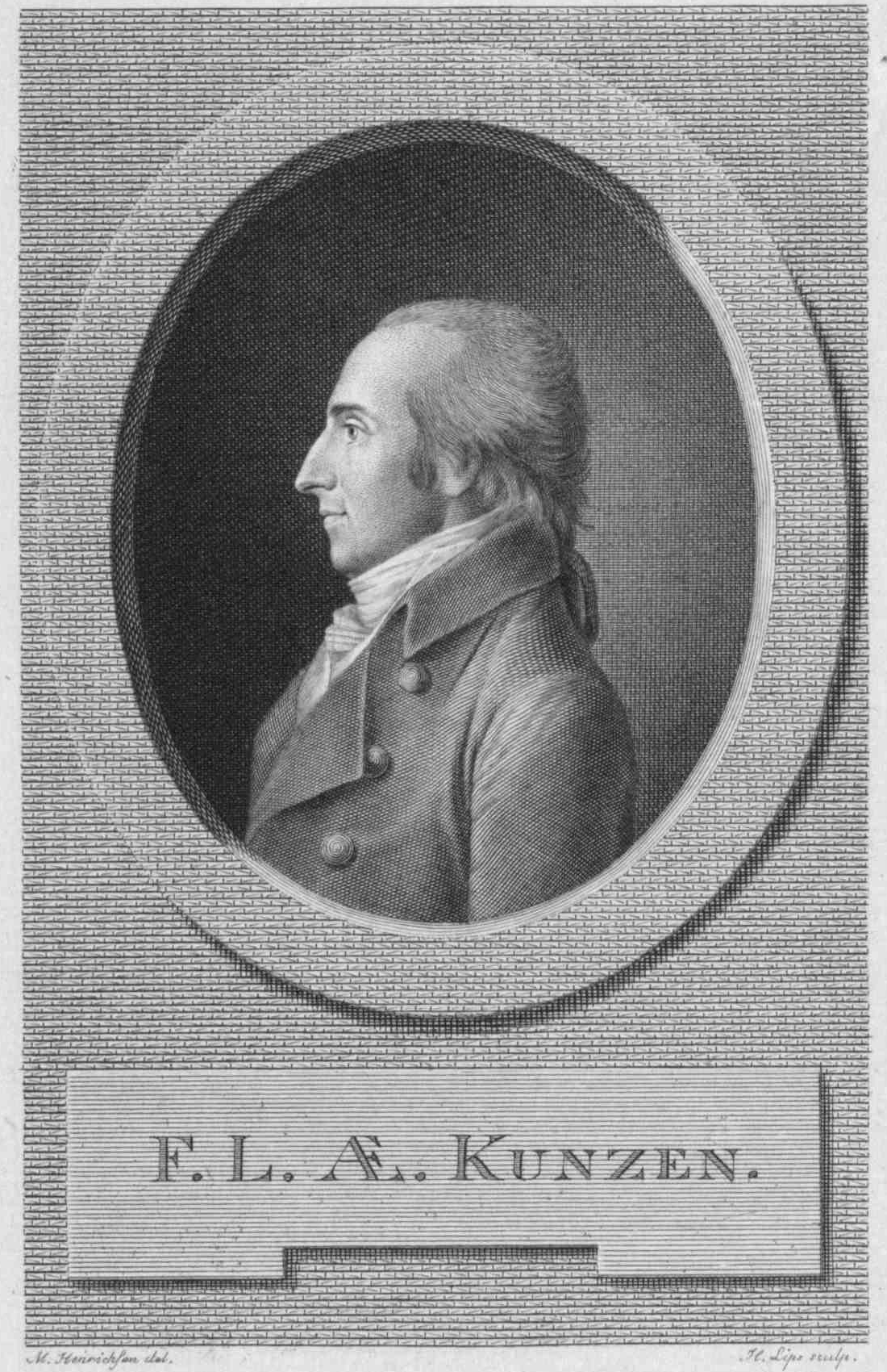 Billede af komponisten og dirigenten F. L. Æ. Kunzen, f. 24.9 1761 d. 28.1 1817